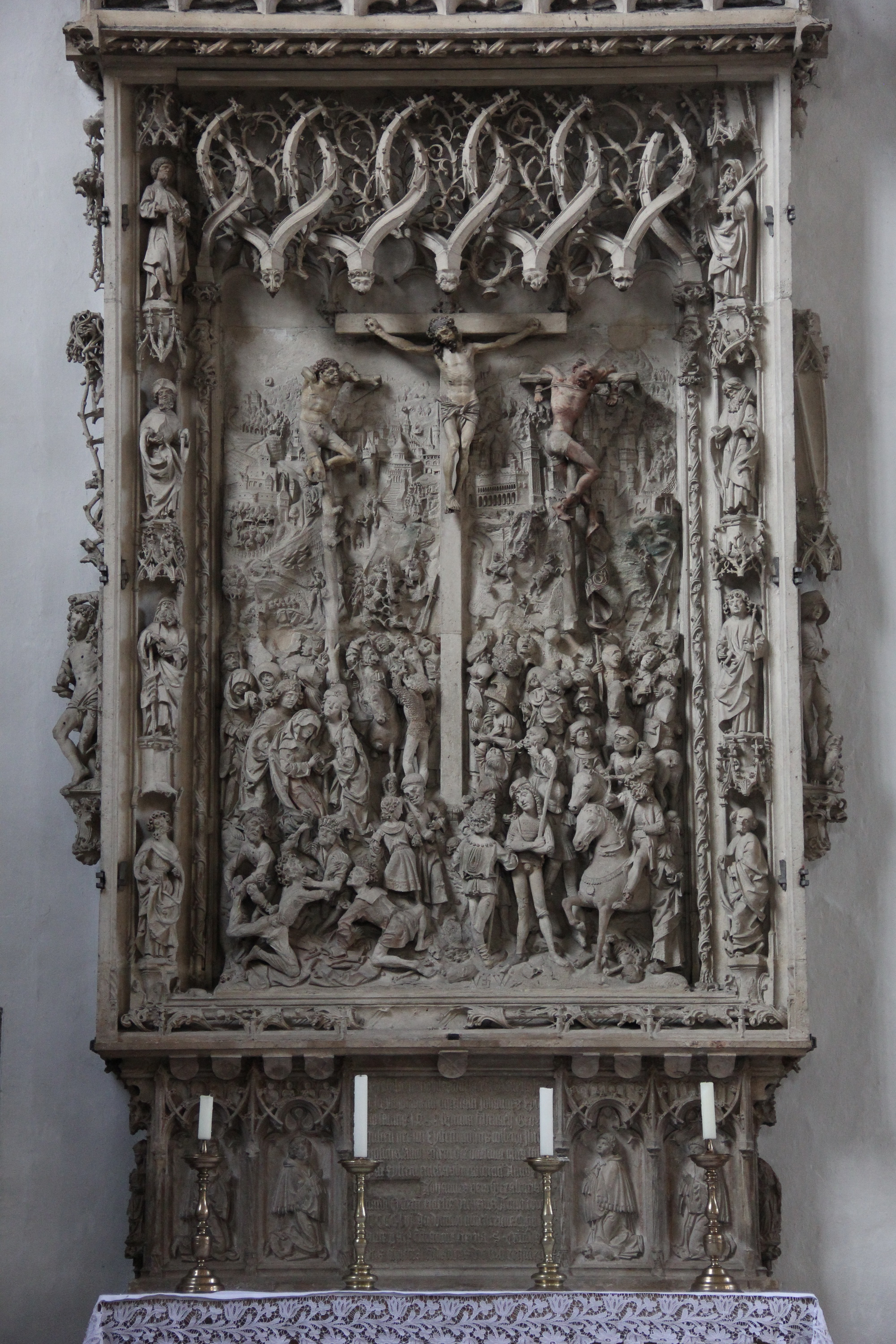 Eichstätt Cathedral Native nameDom zu EichstättLocationEichstätt, Upper Bavaria, GermanyCoordinates48° 53′ 30.86″ N, 11° 11′ 00.56″ E Authority control VIAF: 247706570 GND: 4218076-4